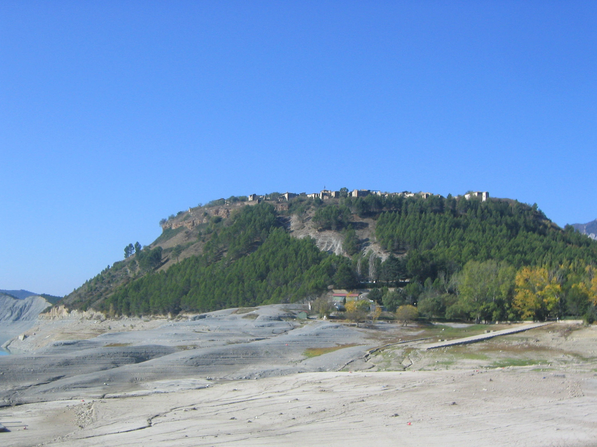 Vista general de Tiermas, Zaragoza España.